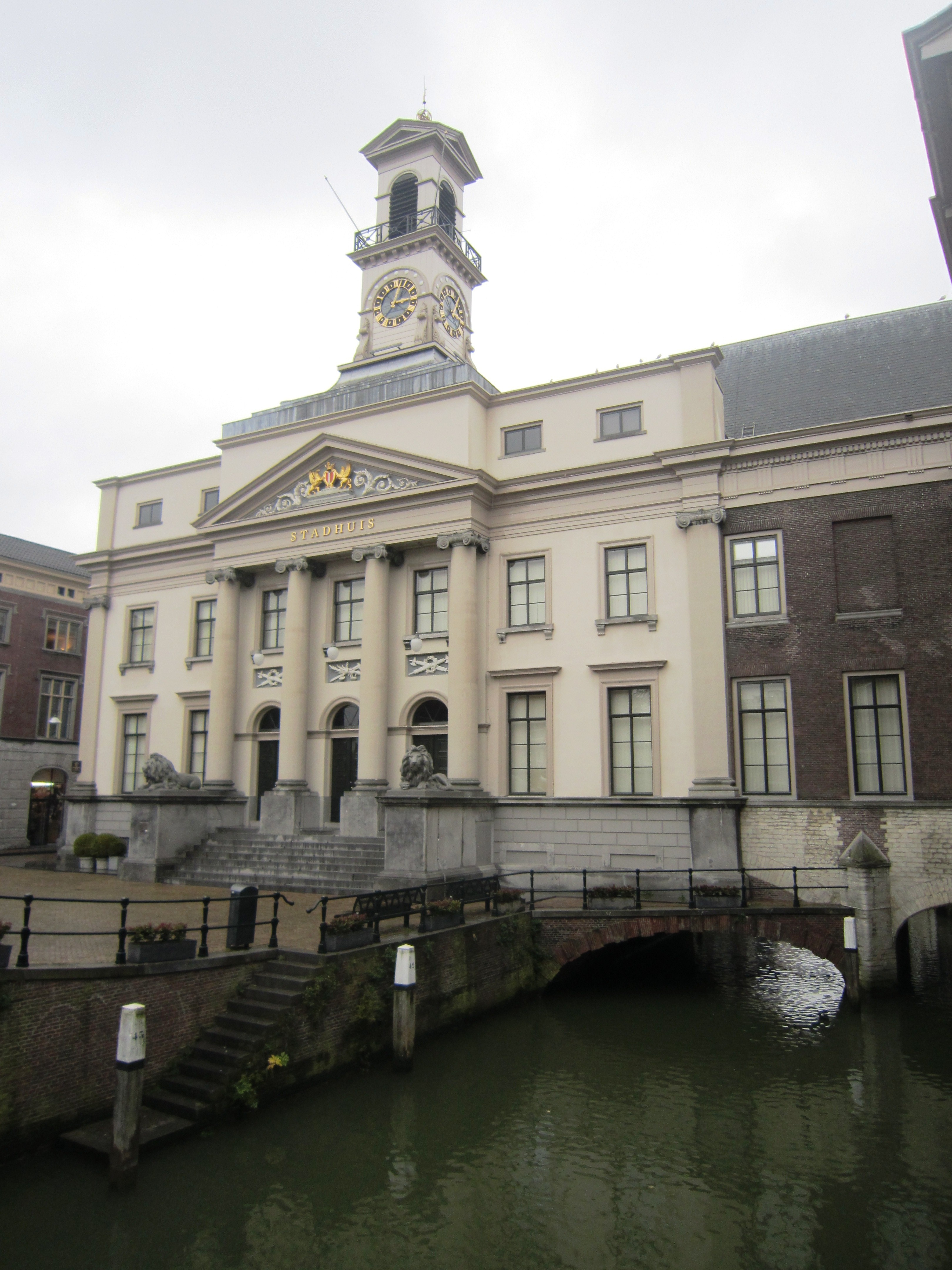 Dordrecht (Nederland). Stadhuis.